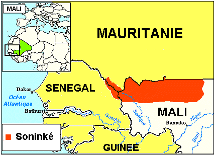 Aire d'extension des Soninkés.